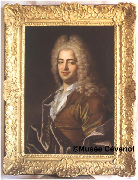 Ce tableau est un don du marquis de Lordat, le biographe de la famille Peyrenc de Moras, originaire du Vigan. Il a été enregistré sous le nom de François-Marie, le fils d'Abraham. Vu la date présumée du tableau communiquée au musée cévenol, il s'agit plutôt de son père, Abraham Peyrenc de Moras (1684 - 1732), jeune et anobli du fait de sa fortune acquise pendant les années de la Régence.